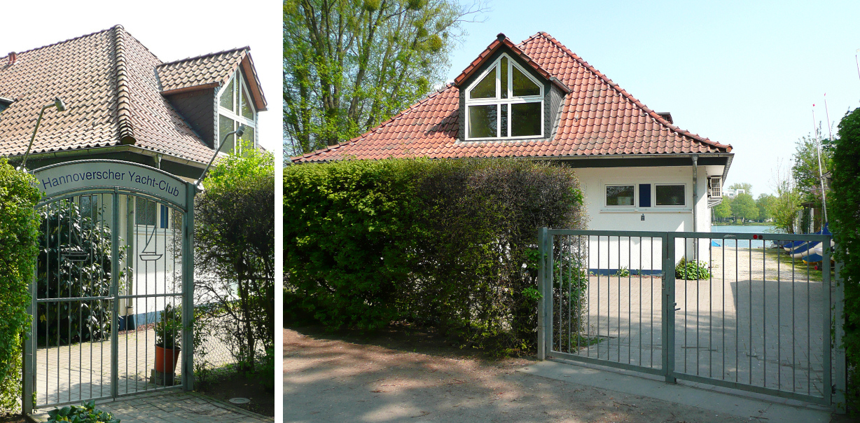 Hannoverscher Yachtclub